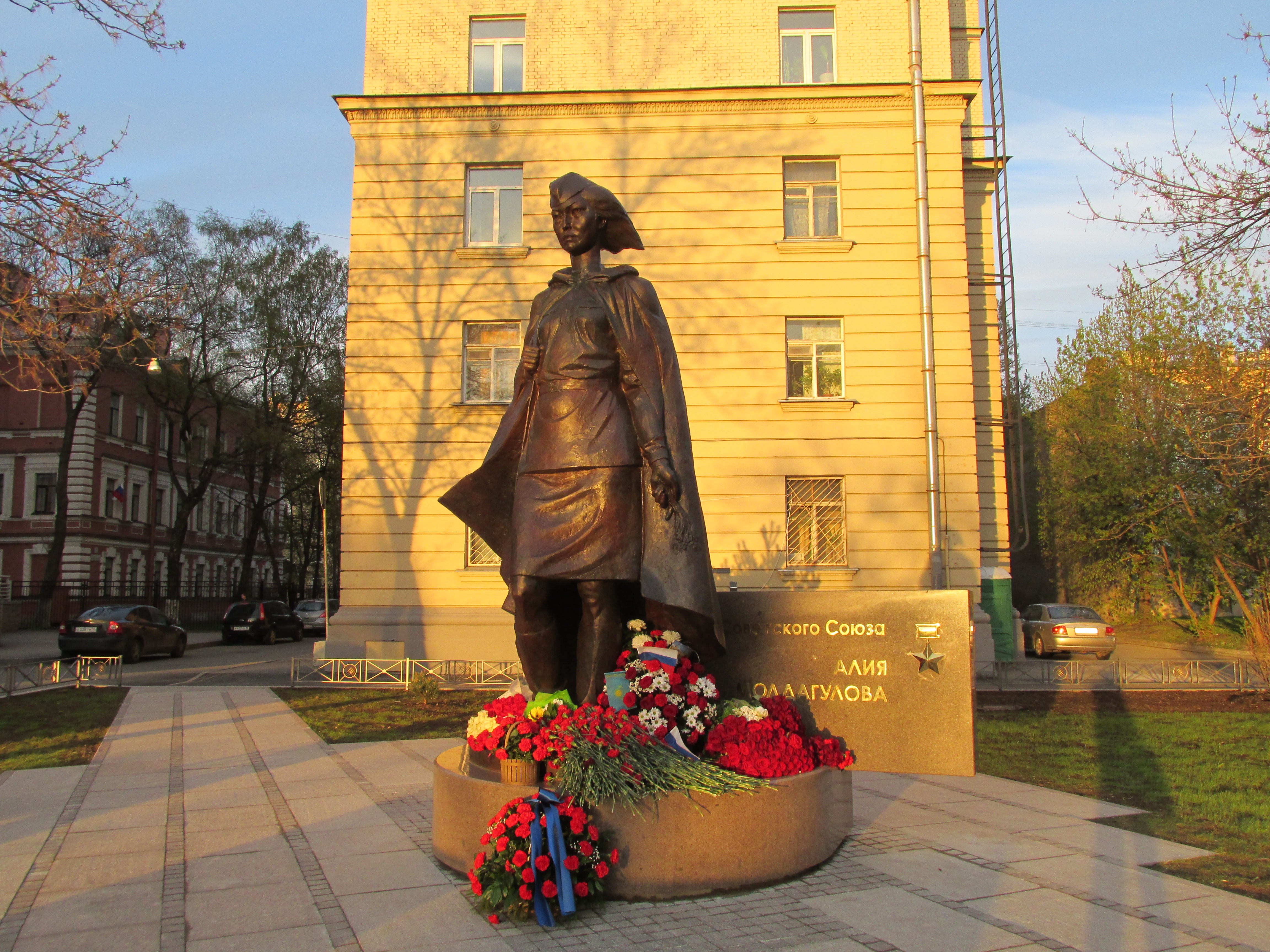 Памятник Алие Молдагуловой на улице её имени в Санкт-Петербурге